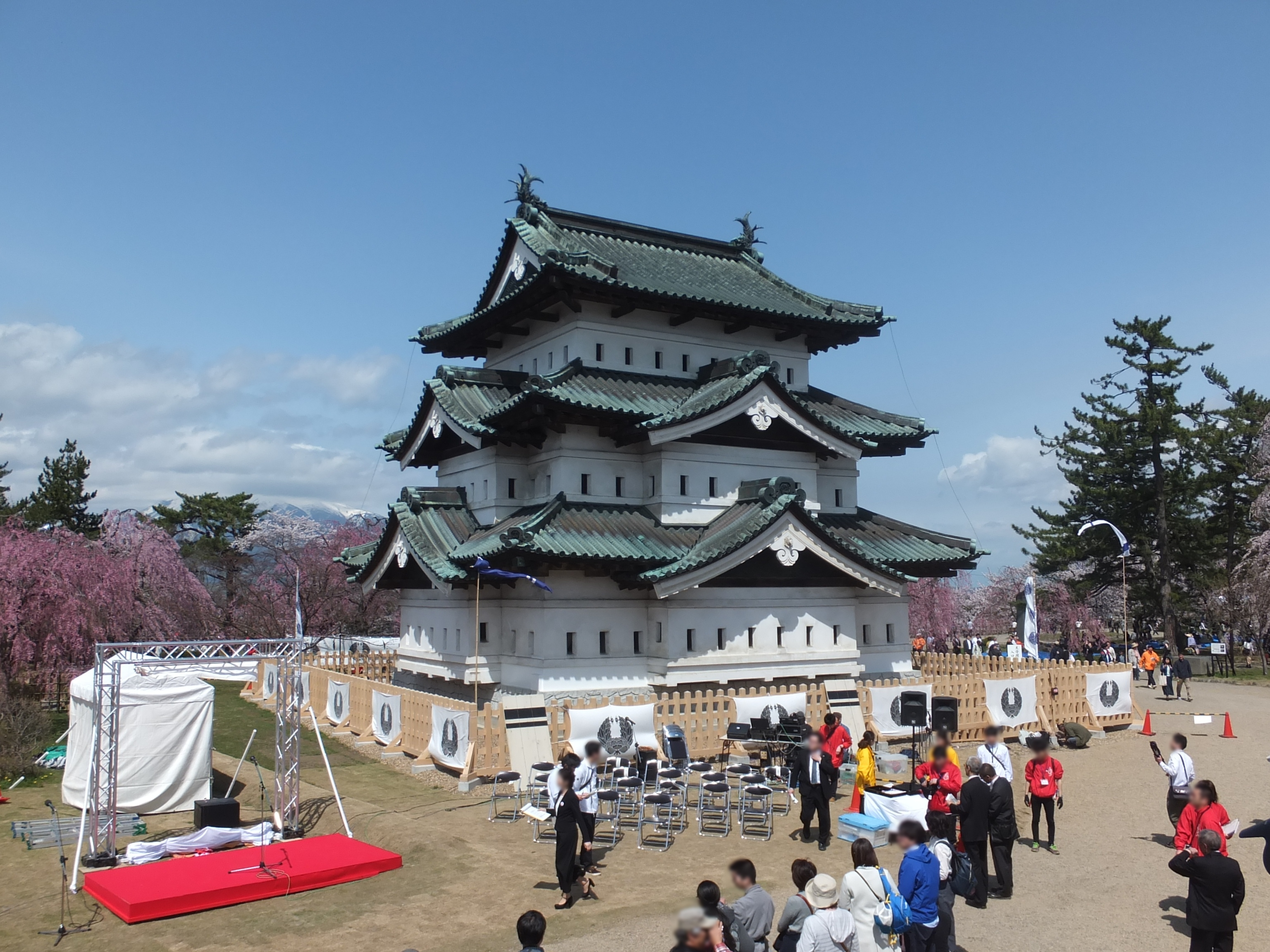 2016年春の弘前城天守閣。天守の耐震補強工事と石垣の補強工事のために2015年秋に曳家工事が行われ、仮の天守台の上に移動された。天守の彼方には岩木山を望む。